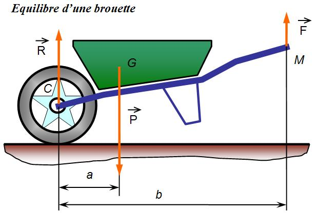 Schéma réalisé sous word.